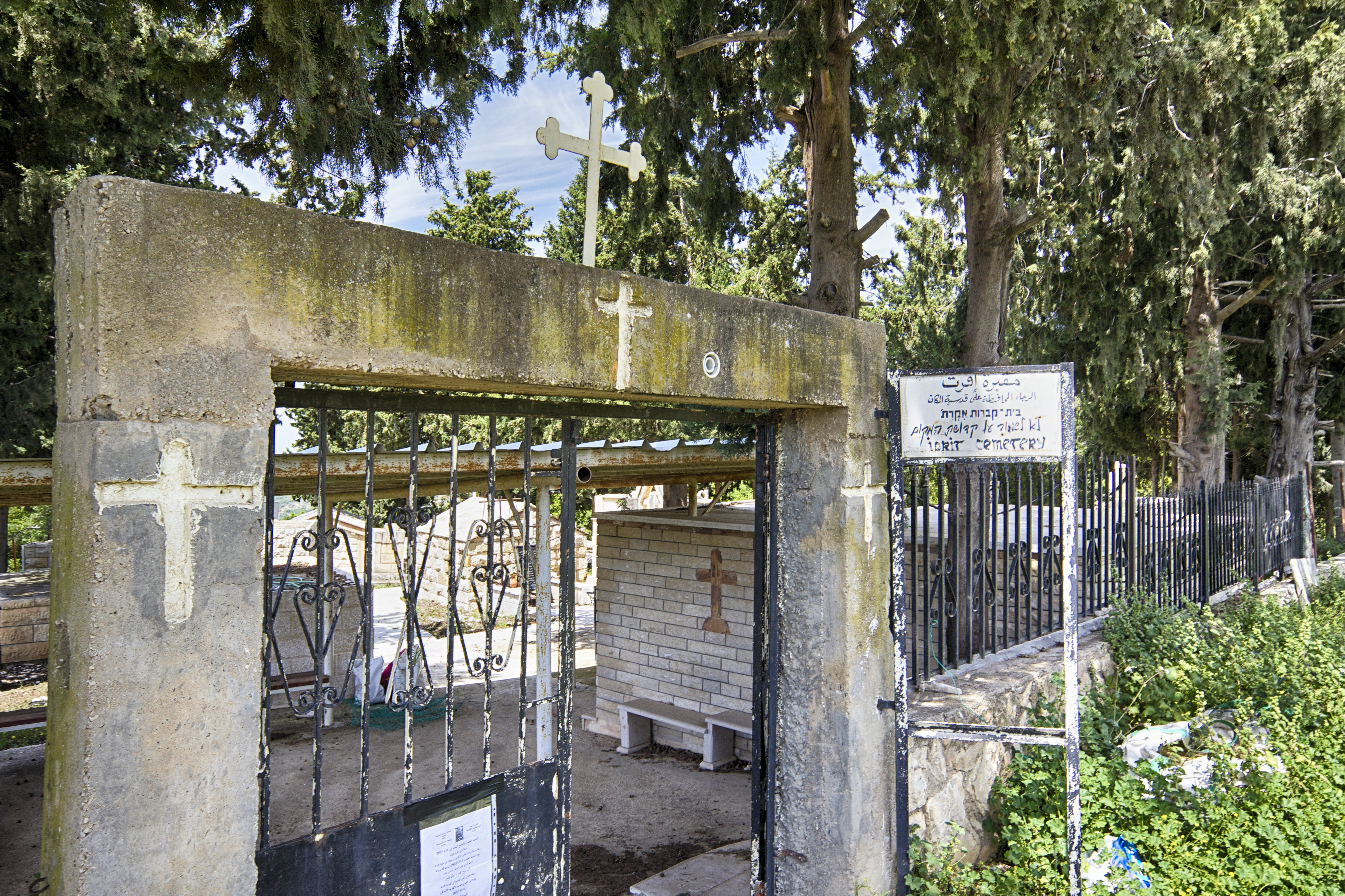 באזור איקרית הייתה התיישבות קדומה עוד מהתקופה הכנענית. הכפר היה אחד מ-19 הכפרים שנכבשו על ידי פרעה תחתמס השלישי. בתקופת המשנה והתלמוד נמצא במקום היישוב היהודי יוקרת. הכפר חרב לאחר התקופה הצלבנית, ויושב מחדש במאה ה-16.